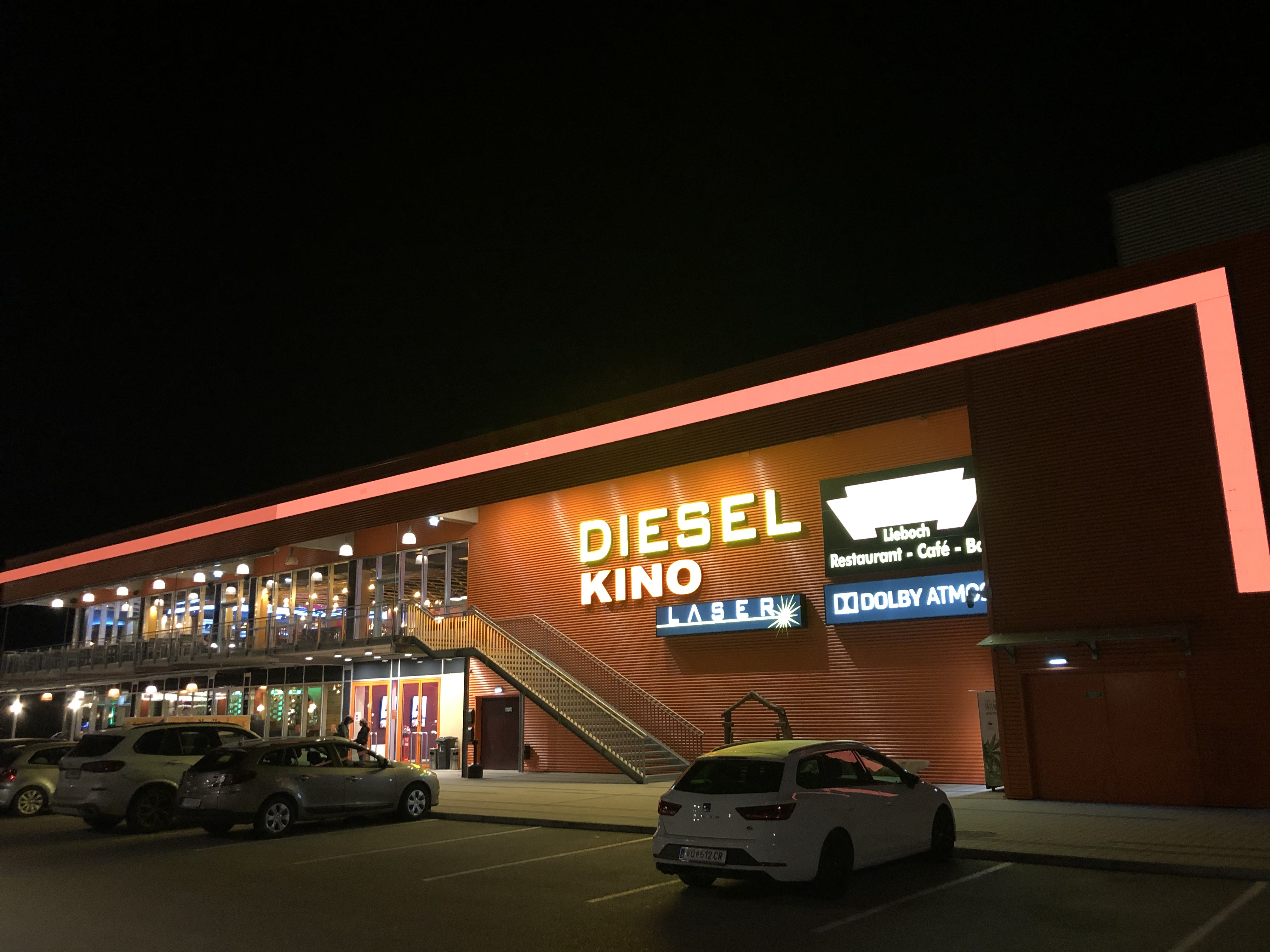 Kinogebäude